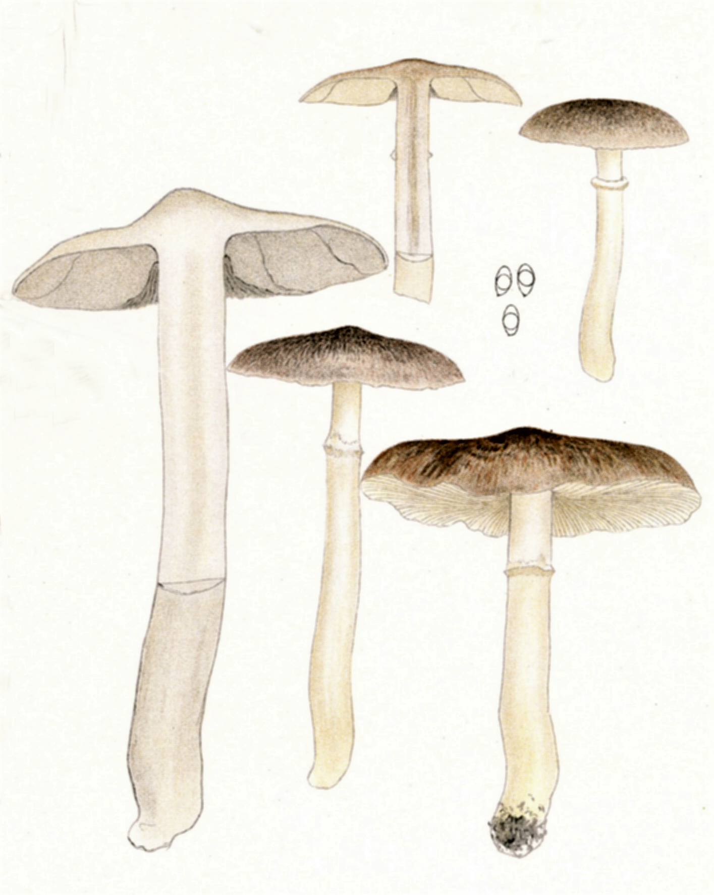 J.E.Lange: Tricholoma cingulatum (Almfelt, 1830) Jacobasch (1890) [1892]